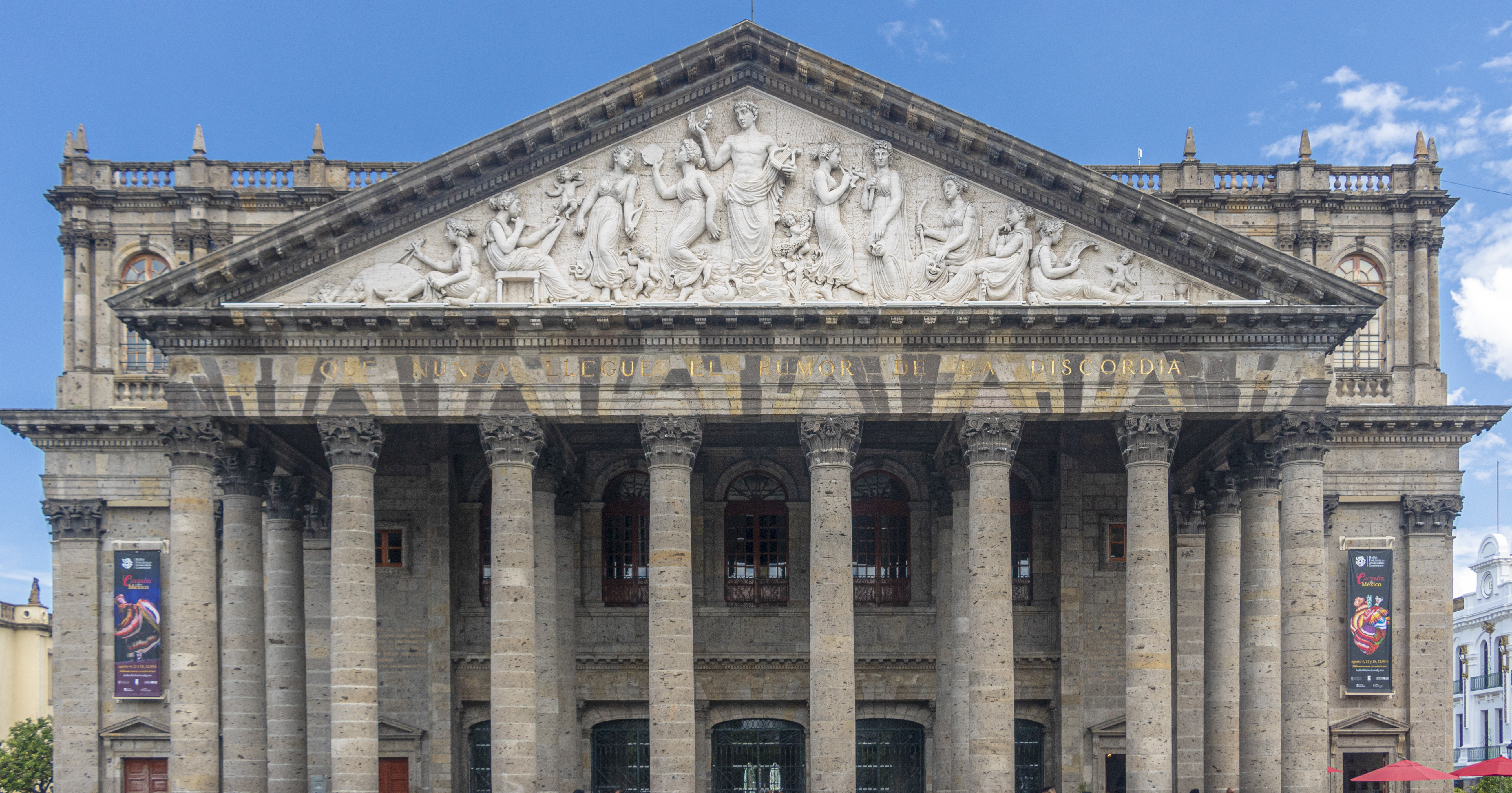 teatro degollado